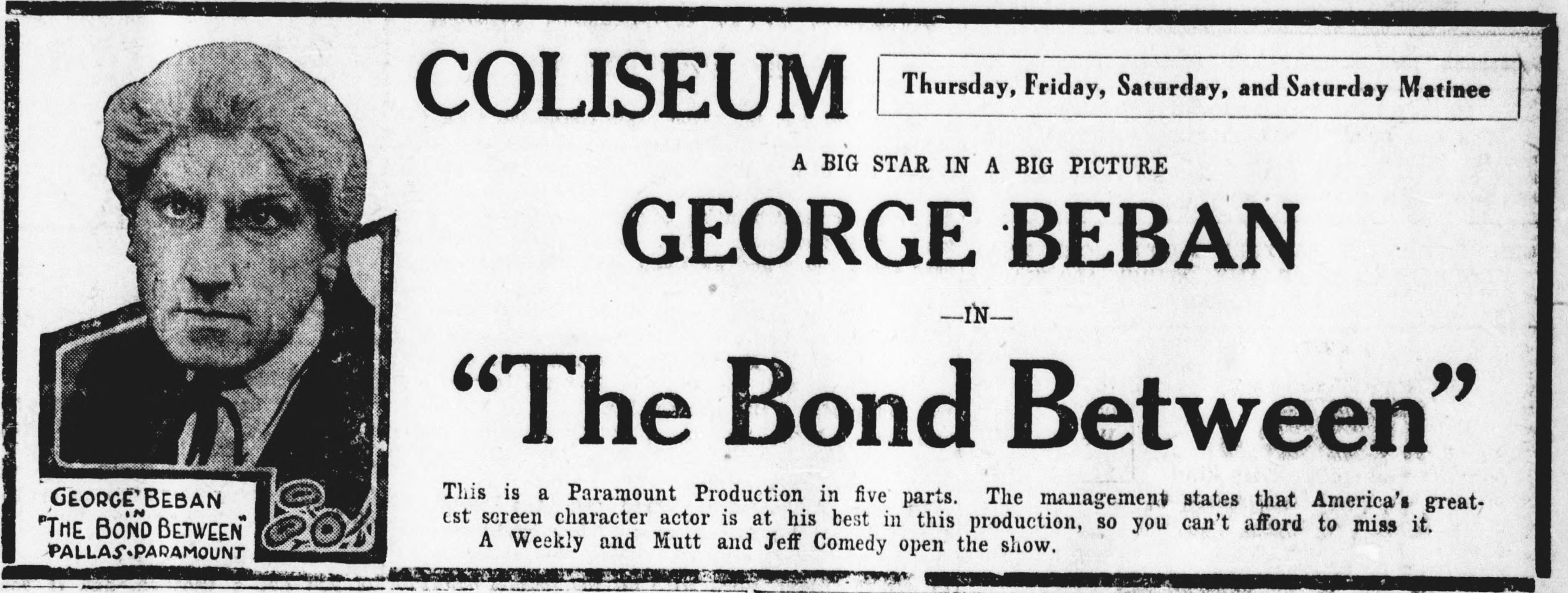 Newspaper advert